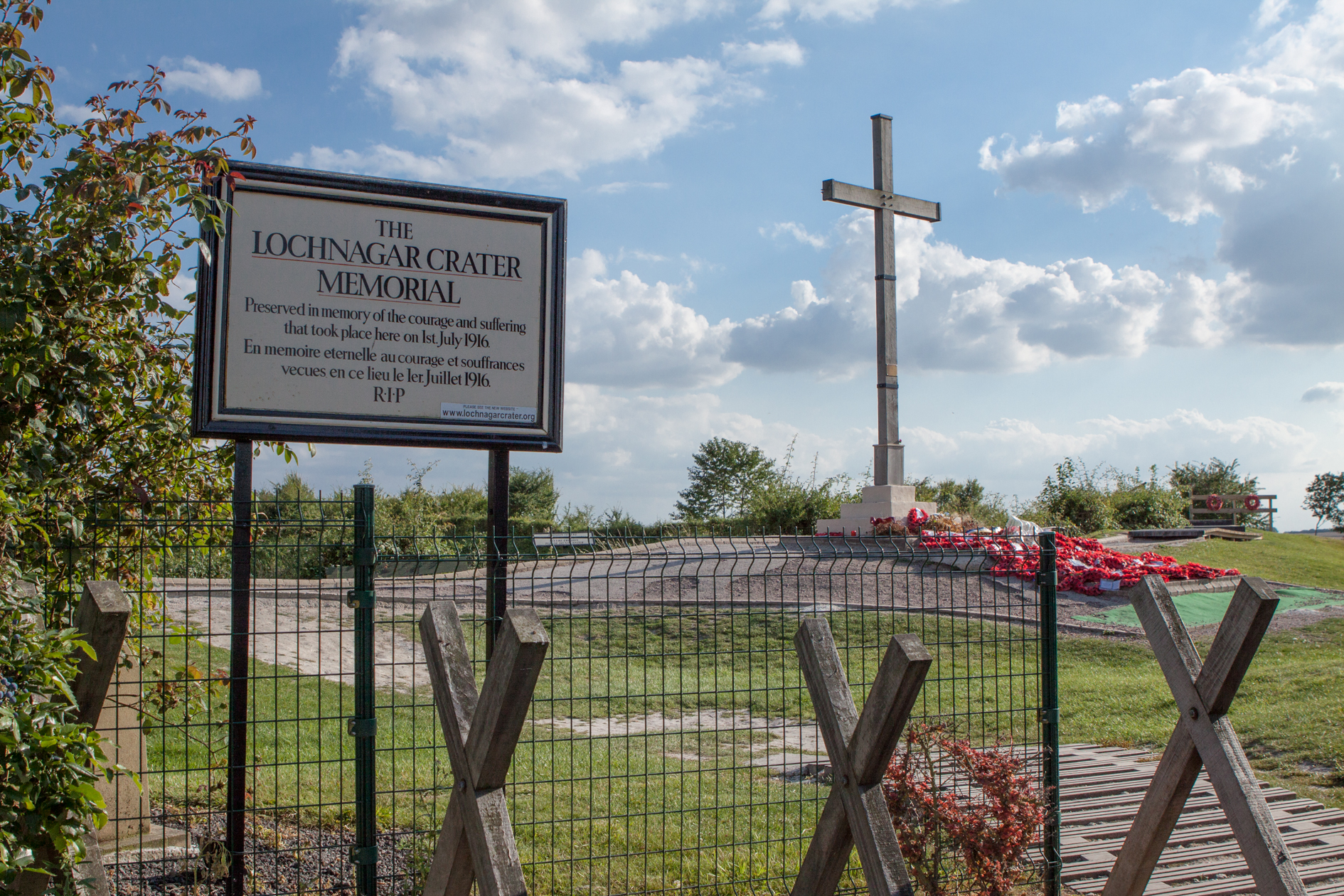 Lochnagar Crater